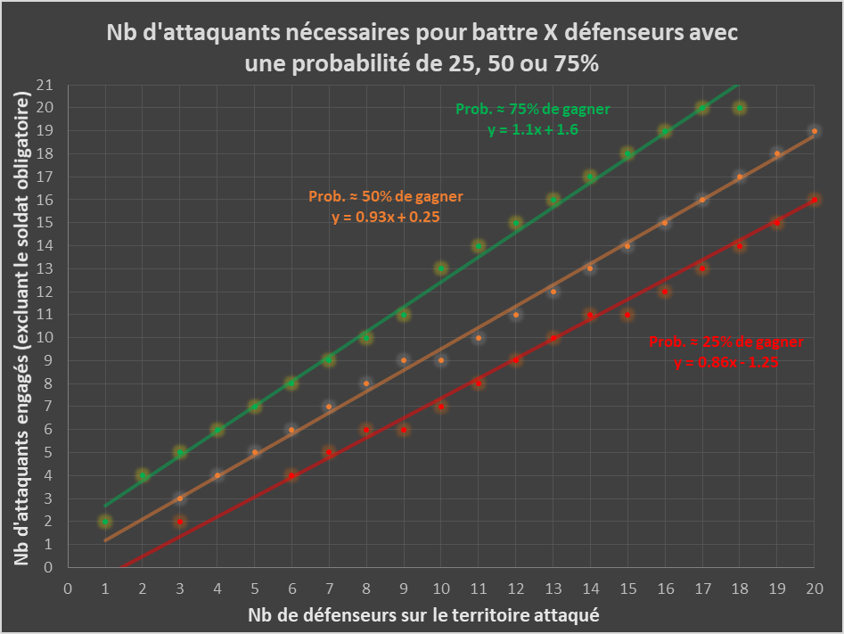 Version condensée du tableau précédent permettant de savoir combien d'attaquants sont nécessaires pour battre un certain nombre de défenseurs avec une probabilité de 25, 50 ou 75%